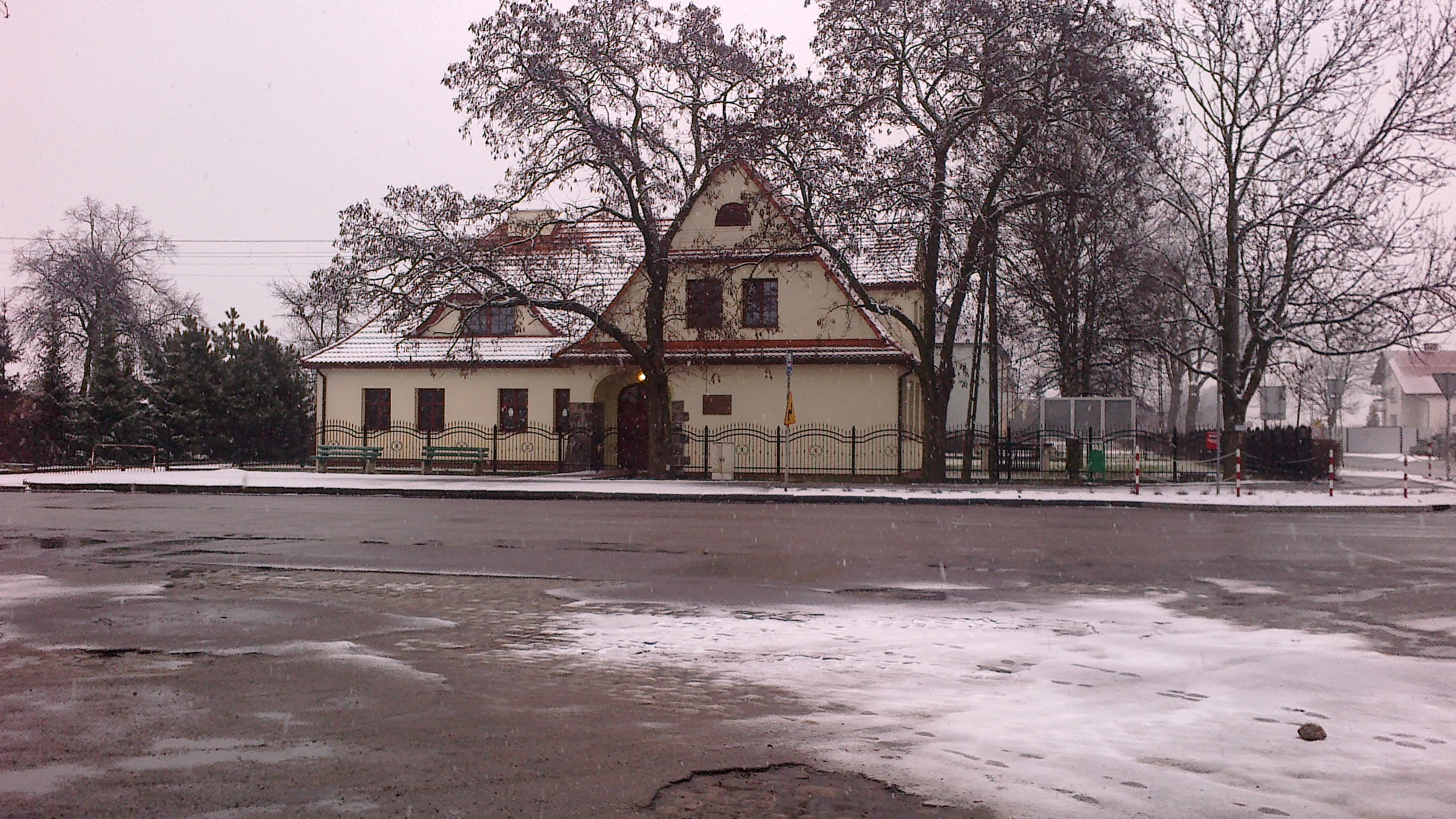 MCPD Janikowo